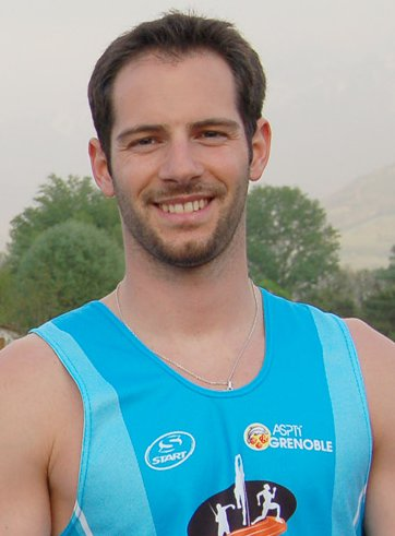 Nicolas Guigon saut à la perche